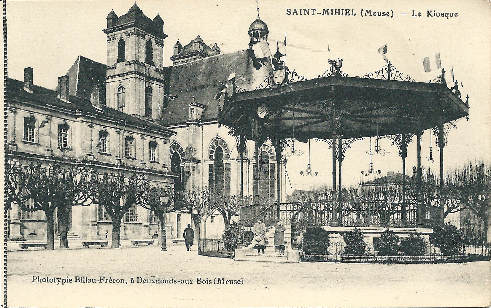 Saint-Mihiel (Meuse, France) , avant 1914.